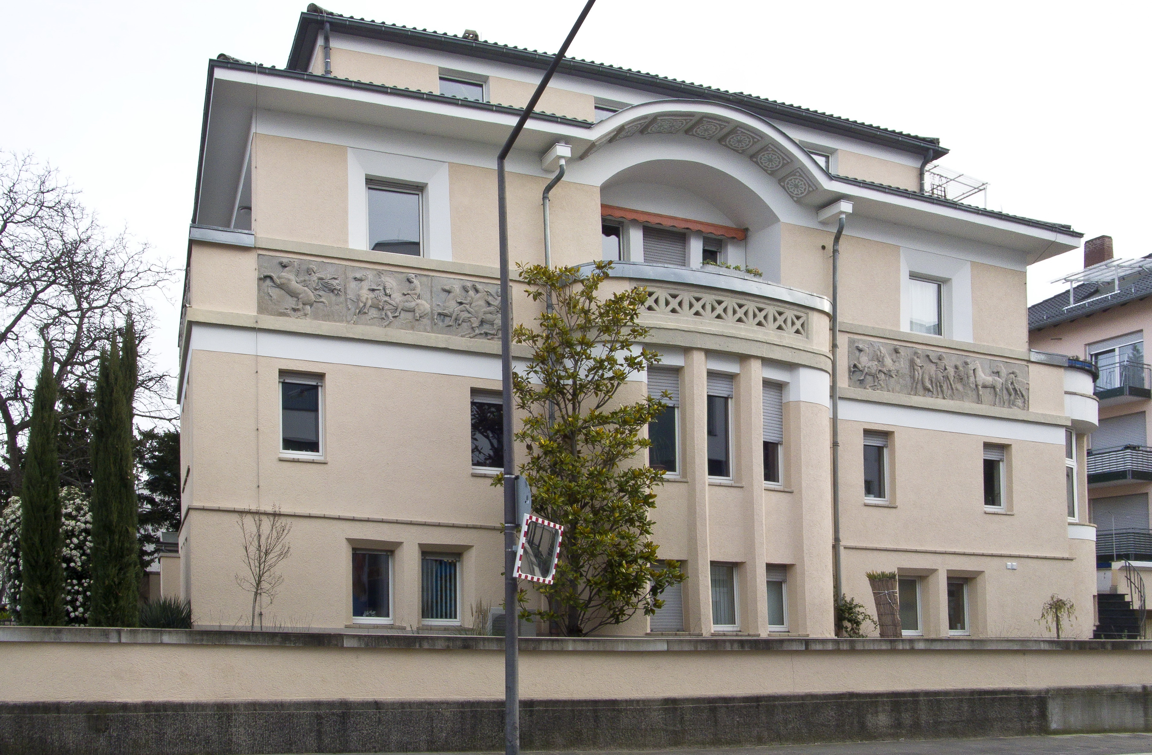 Worms, Villa, Rathenaustraße 4, Walmdach-Villa, sachlich gehaltene Jugendstil-Motive, umlaufender Fries, 1913